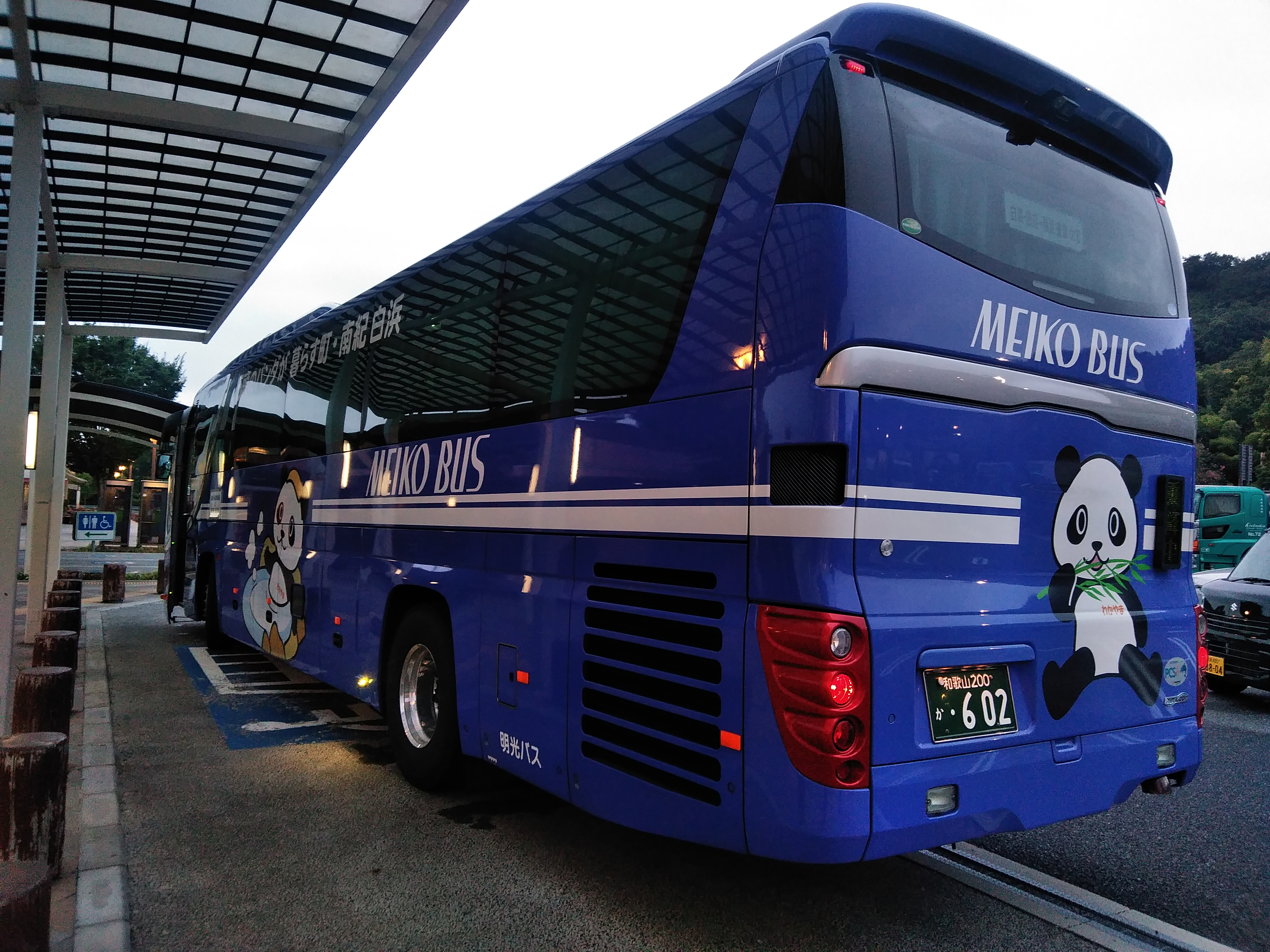 明光バスのホワイトビーチシャトル号、南紀白浜のマスコットであるパンダが車体に描かれている。